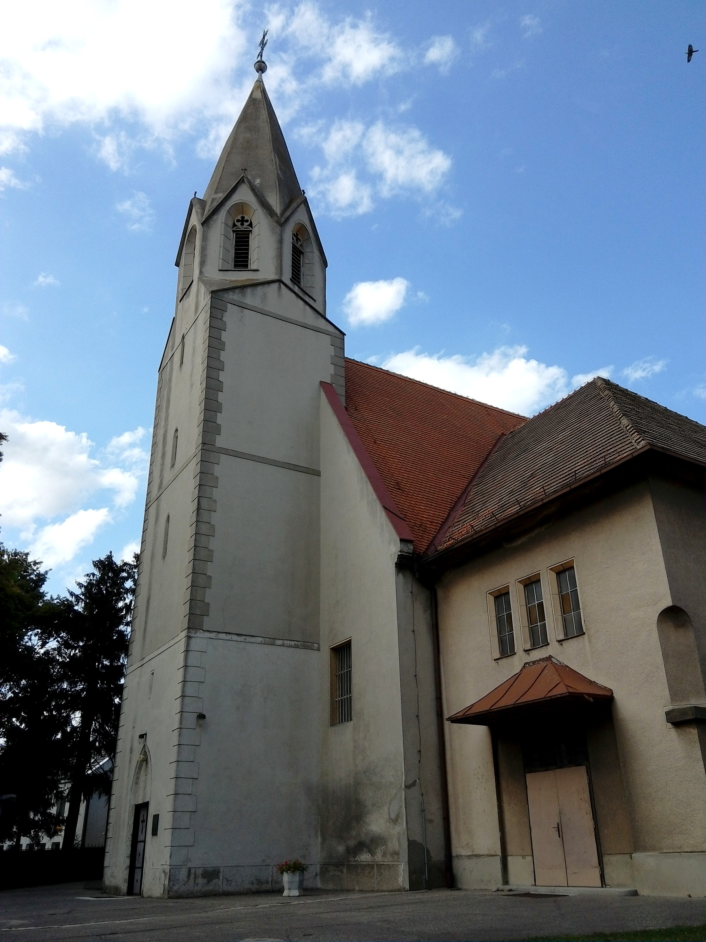 Bratislava-Podunajské Biskupice, Kostol svätého Mikuláša; pohľad od juhozápadu